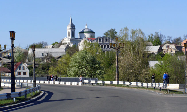 Богуслав із правого берега Росі